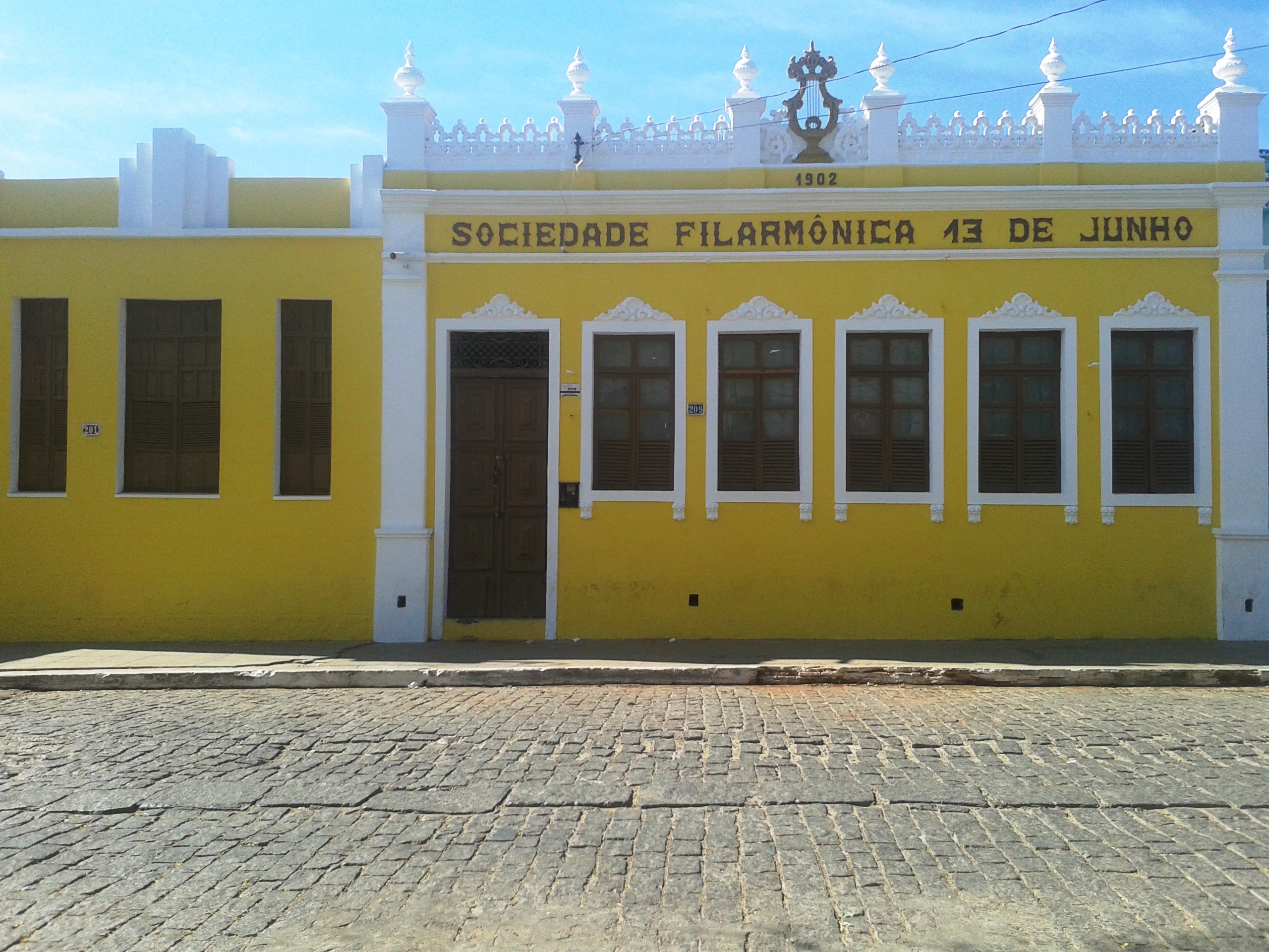 Prédio da Sociedade Filarmônica 13 de Junho, localizada em Paratinga, Bahia, em agosto de 2016.